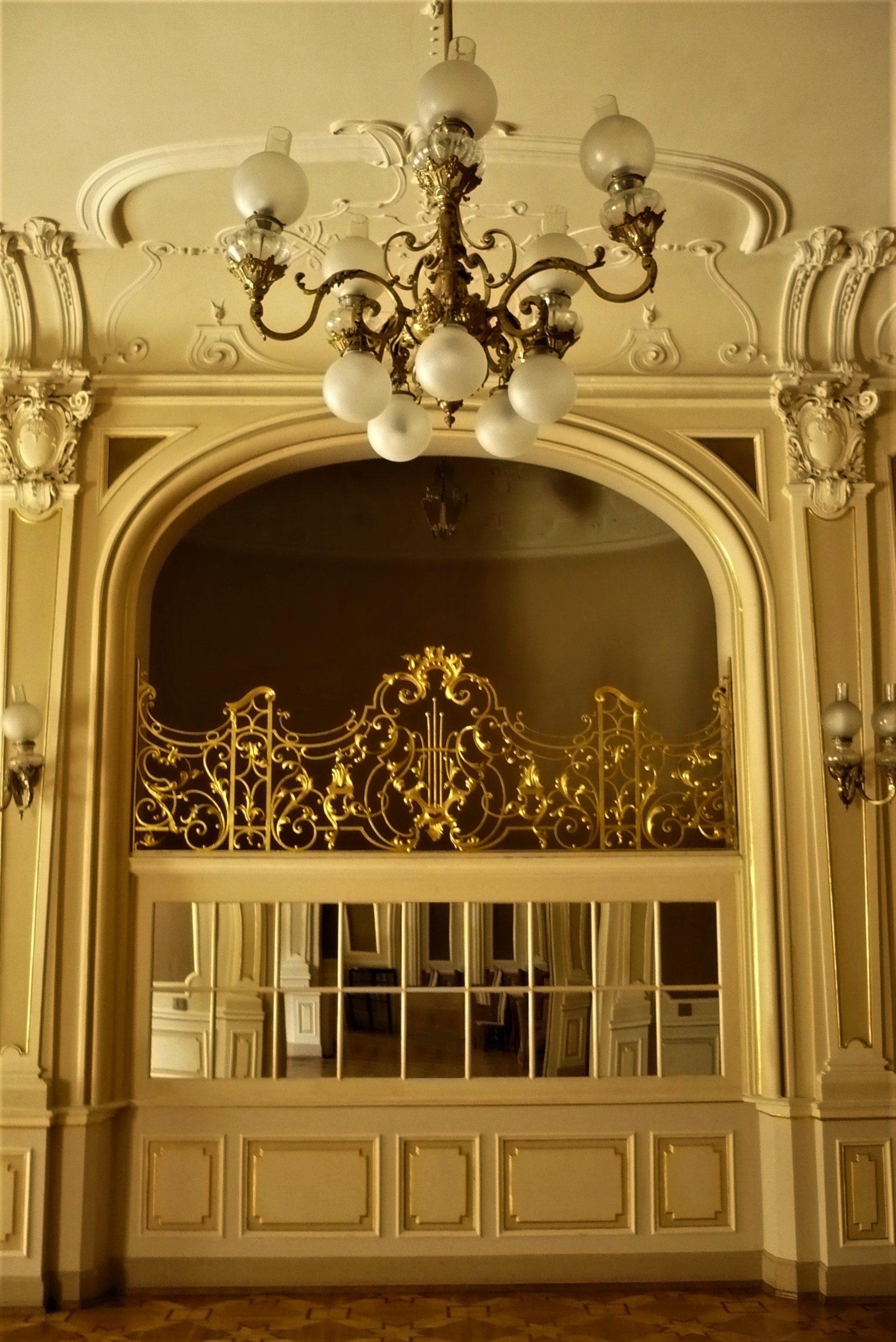 Kasyno Szlacheckie we Lwowie